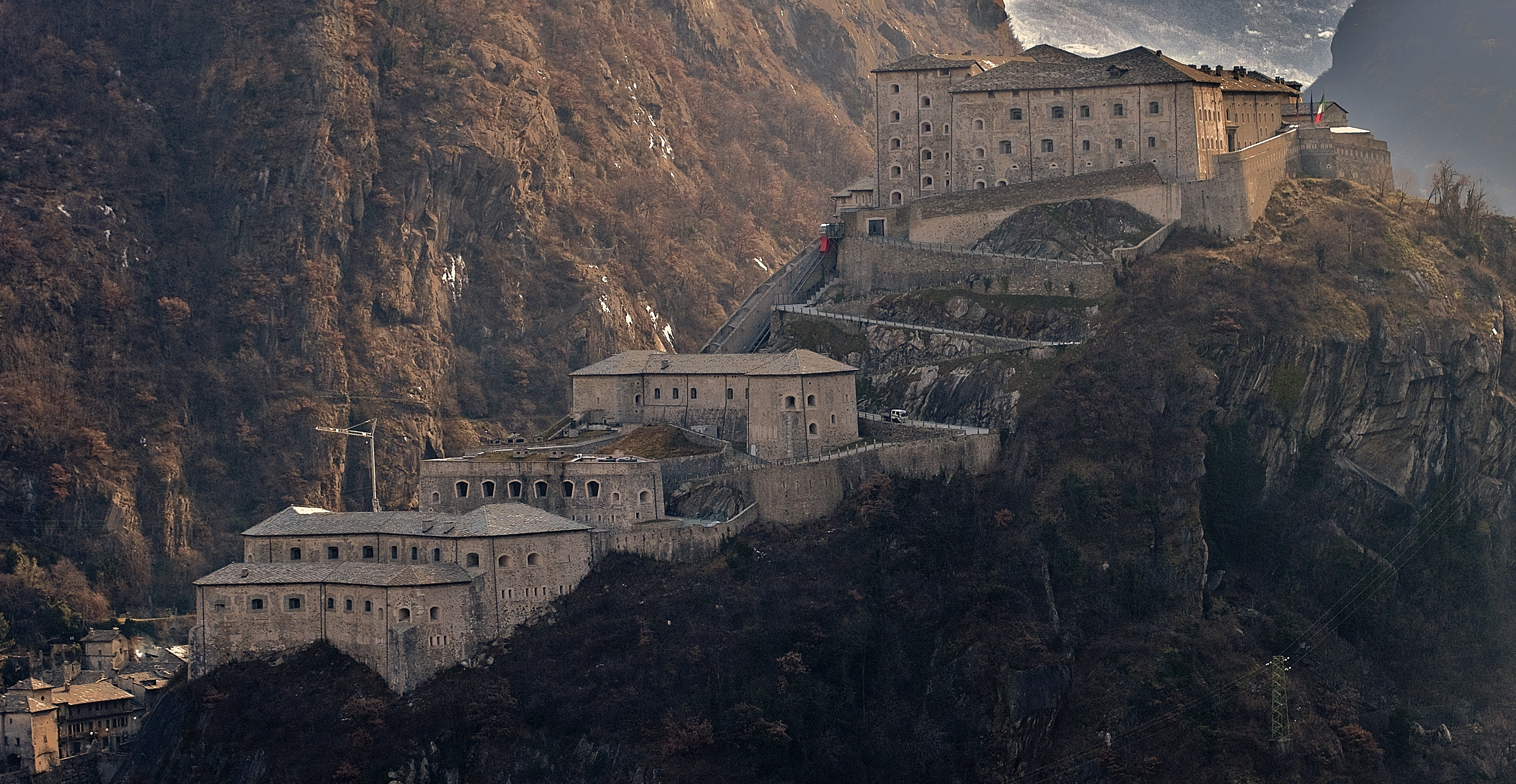 Forte di Bard This is a photo of a monument which is part of cultural heritage of Italy.